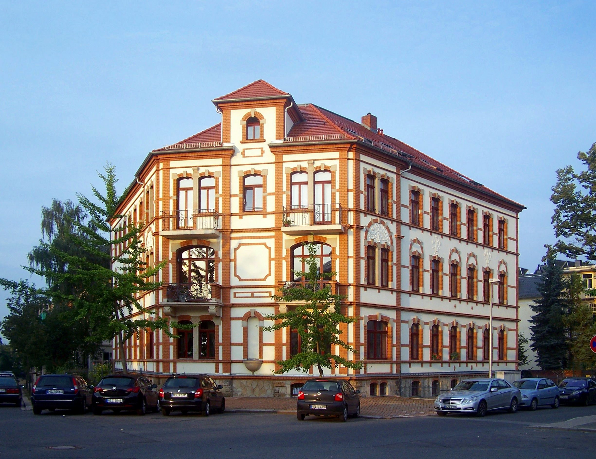 Hellerstr. 9 in Radebeul